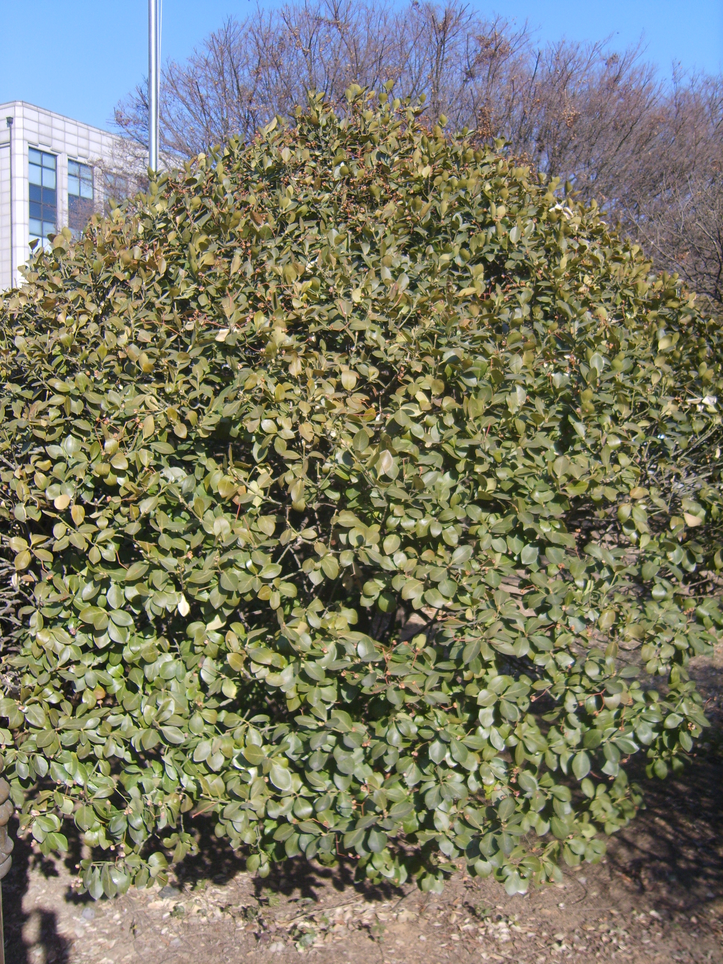 Euonymus japonicus in Incheon Korea. 인천광역시 교육청 앞 정원에 사는 사철나무.